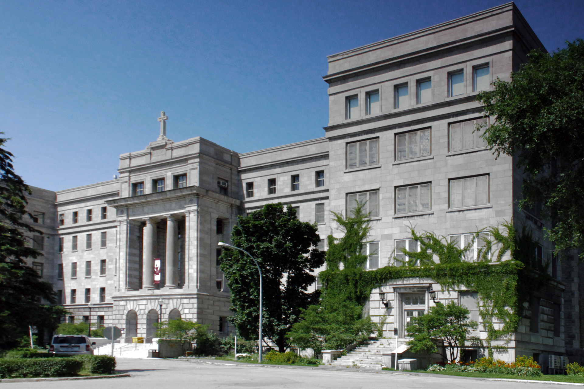 Pavillon Ignace-Bourget de l'Hôpital Louis-H.-Lafontaine, Montréal, Québec